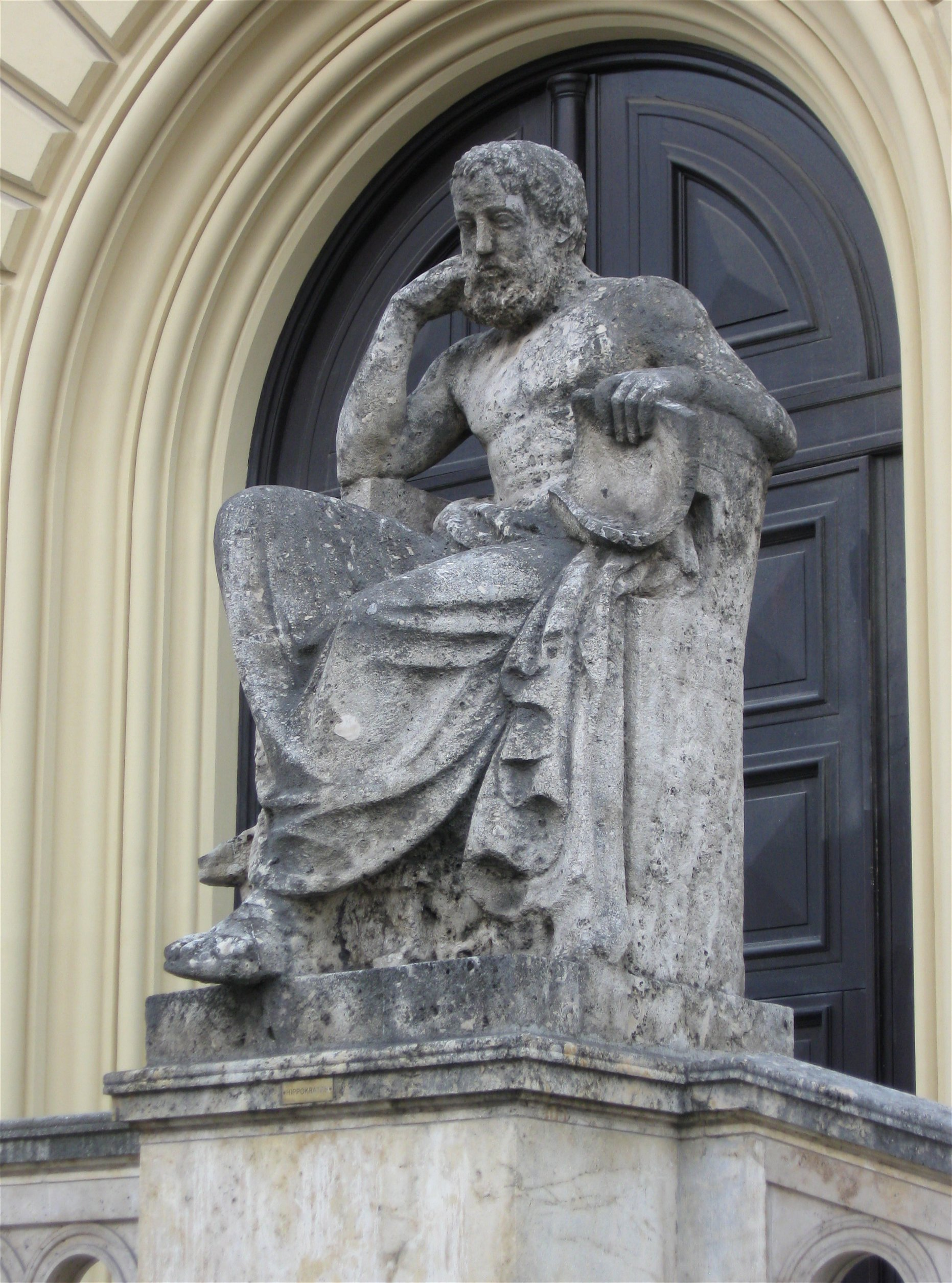 München, Ludwigstraße 16; Bayerische Staatsbibliothek, 1832–39 von Friedrich von Gärtner; Hippokrates-Denkmal vor dem Eingangsportal, Kopie von Karl Krohe (nach dem 2.Weltkrieg); Das Original von Francesco Sanguinetti (Entwurf: Ludwig Michael Schwanthaler) befindet sich seit 1964 auf dem Schulpark der Grundschule in Bernau am Chiemsee (Denkmal D-1-87-118-44).